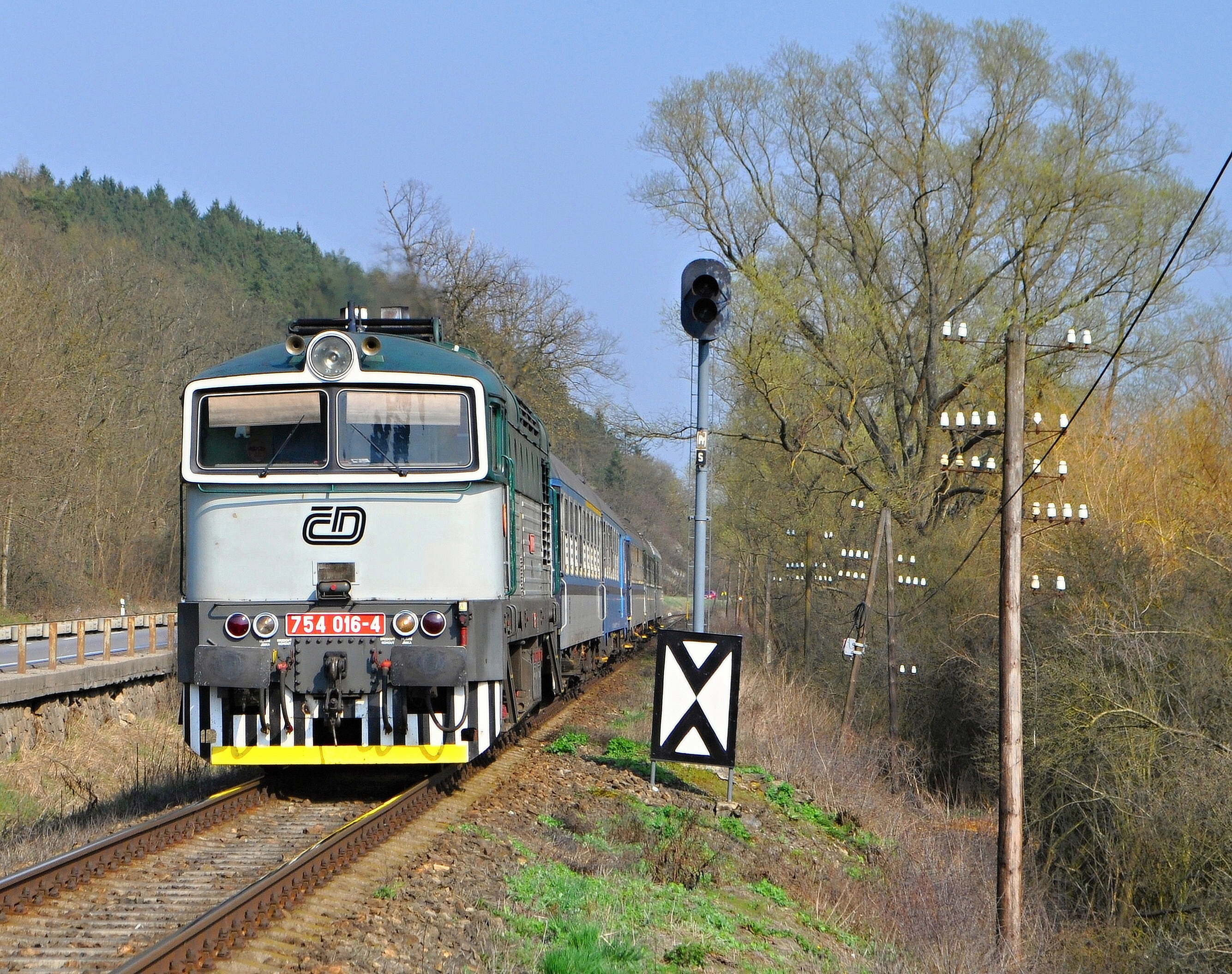 Lokomotiva řady 754 "Brejlovec" (754.016 DKV Brno) projíždí kolem předvěsti typu AŽD 65 na třebíčském zhlaví výhybny Vladislav.